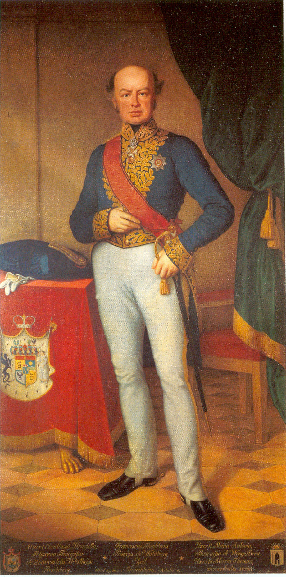 Fürst Franz Thaddäus von Waldburg-Zeil-Trauchburg (1778 – 1845) Ölgemälde Ahnengalerie auf Schloss Zeil